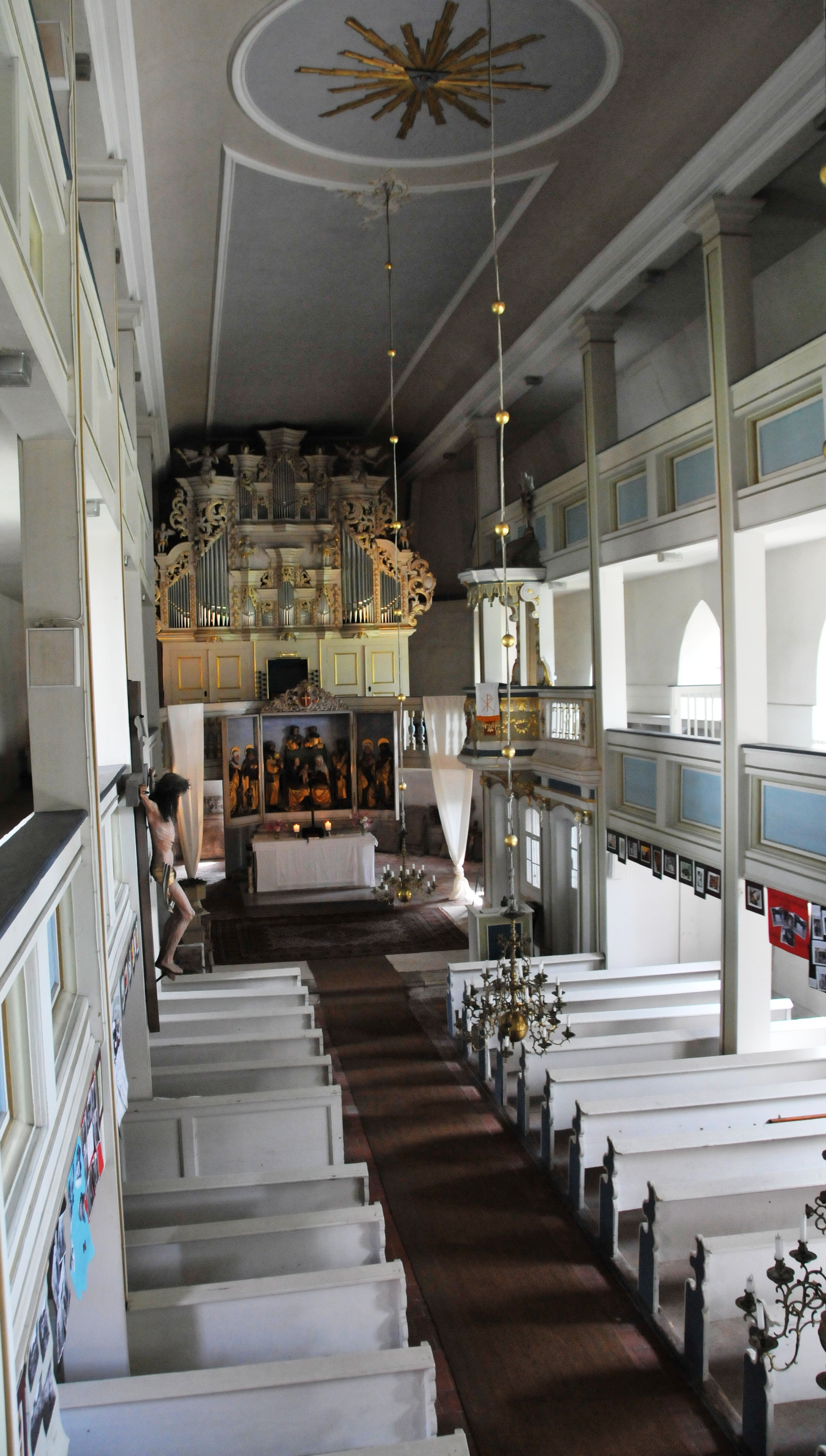 Wandersleben, Kirche